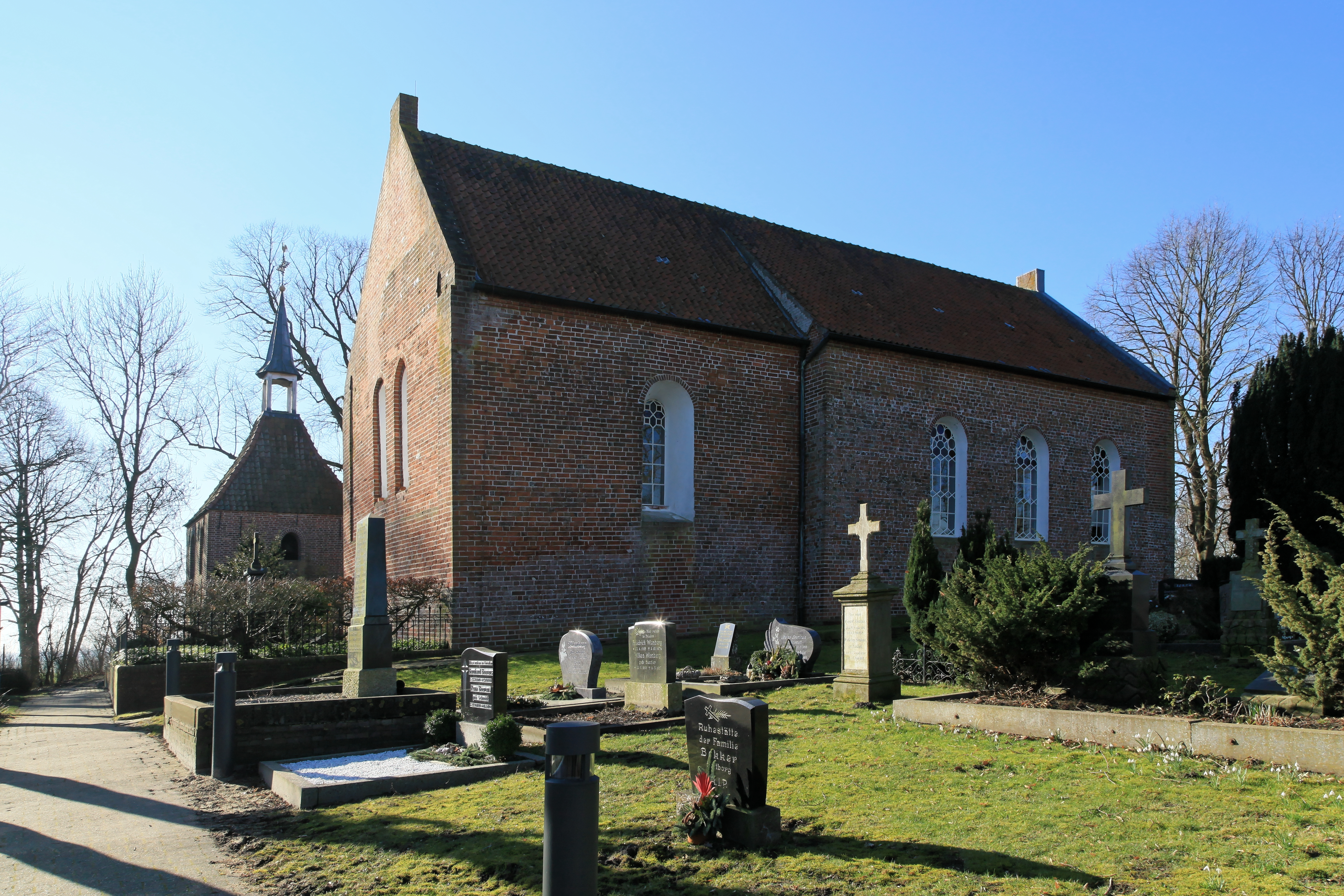 Friedhof, Liudgeri-Kirche und Glockenturm in Holtgaste, Jemgum